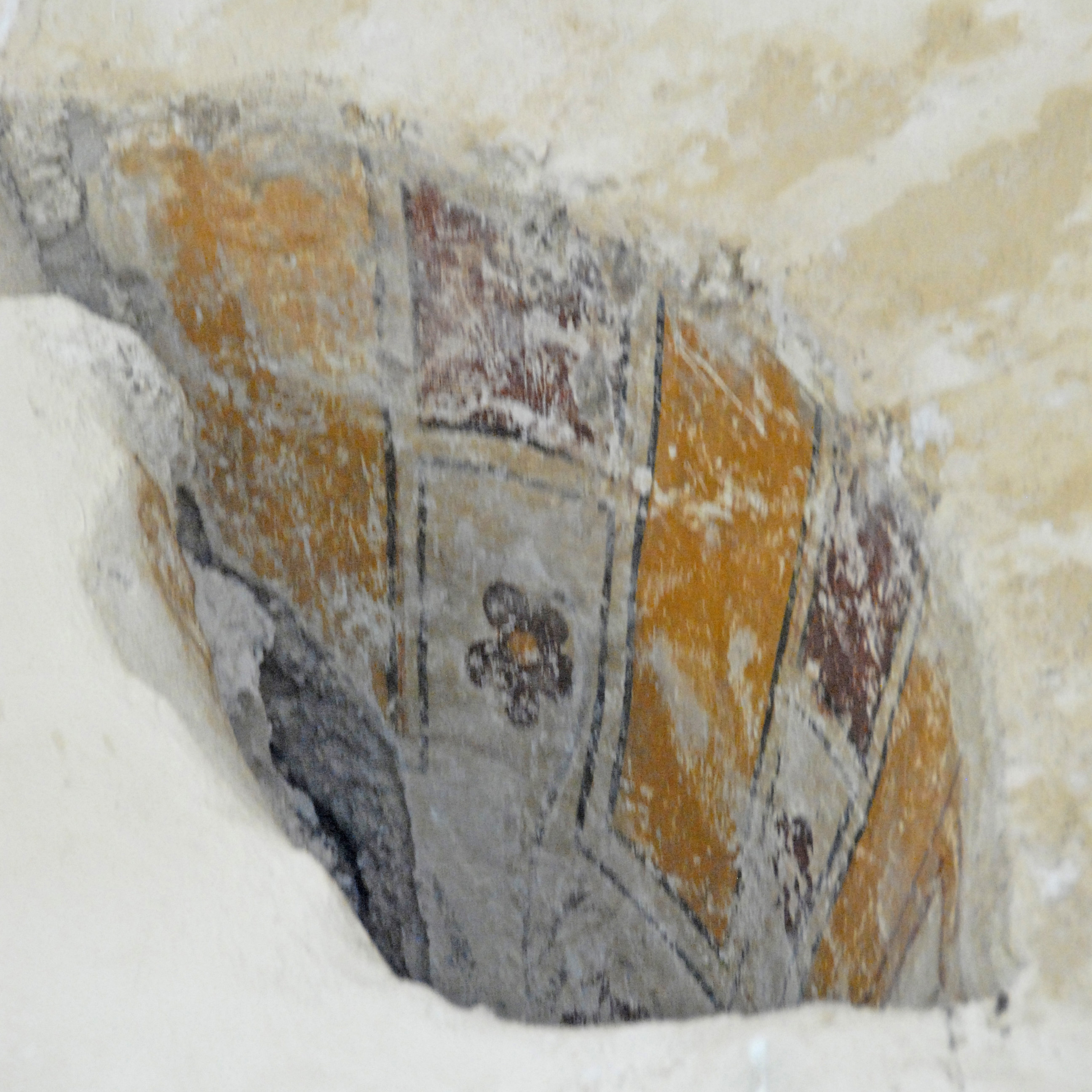 St.-Jean Glaine-Montaigut, Spuren Polychromie Anf. 12. Jh.